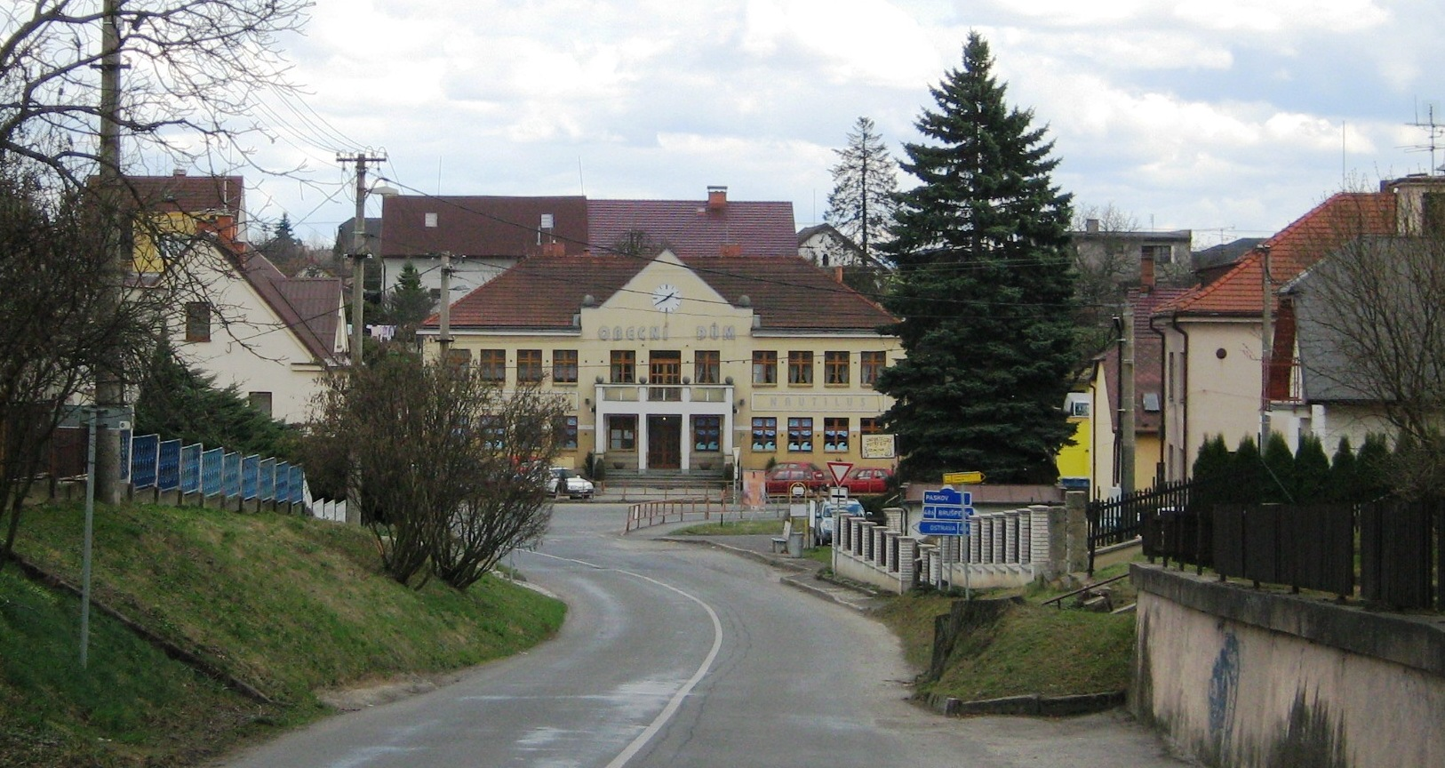 Krmelín-centrum